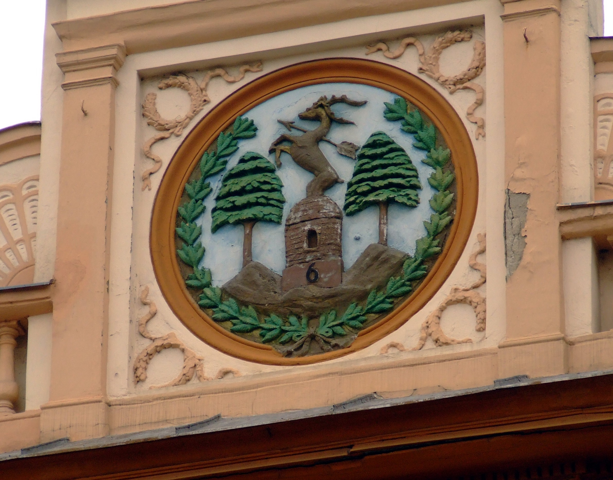 Kiskőrös 1884-ből származó címere. Dombormű a kiskőrösi városháza homlokzatán